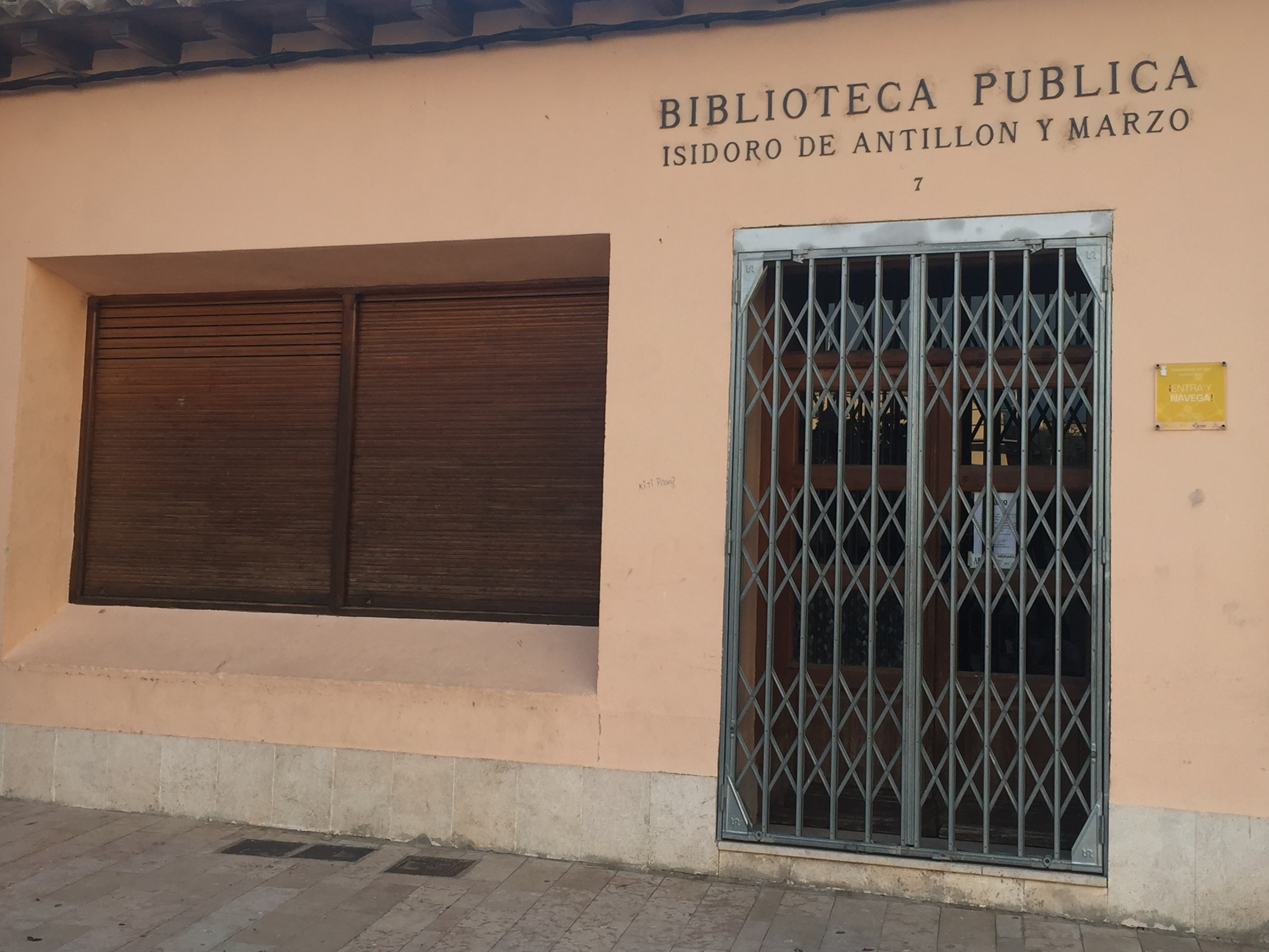 Biblioteca Pública Municipal Isidoro de Antillón y Marzo Santa Eulalia del Campo (Teruel)